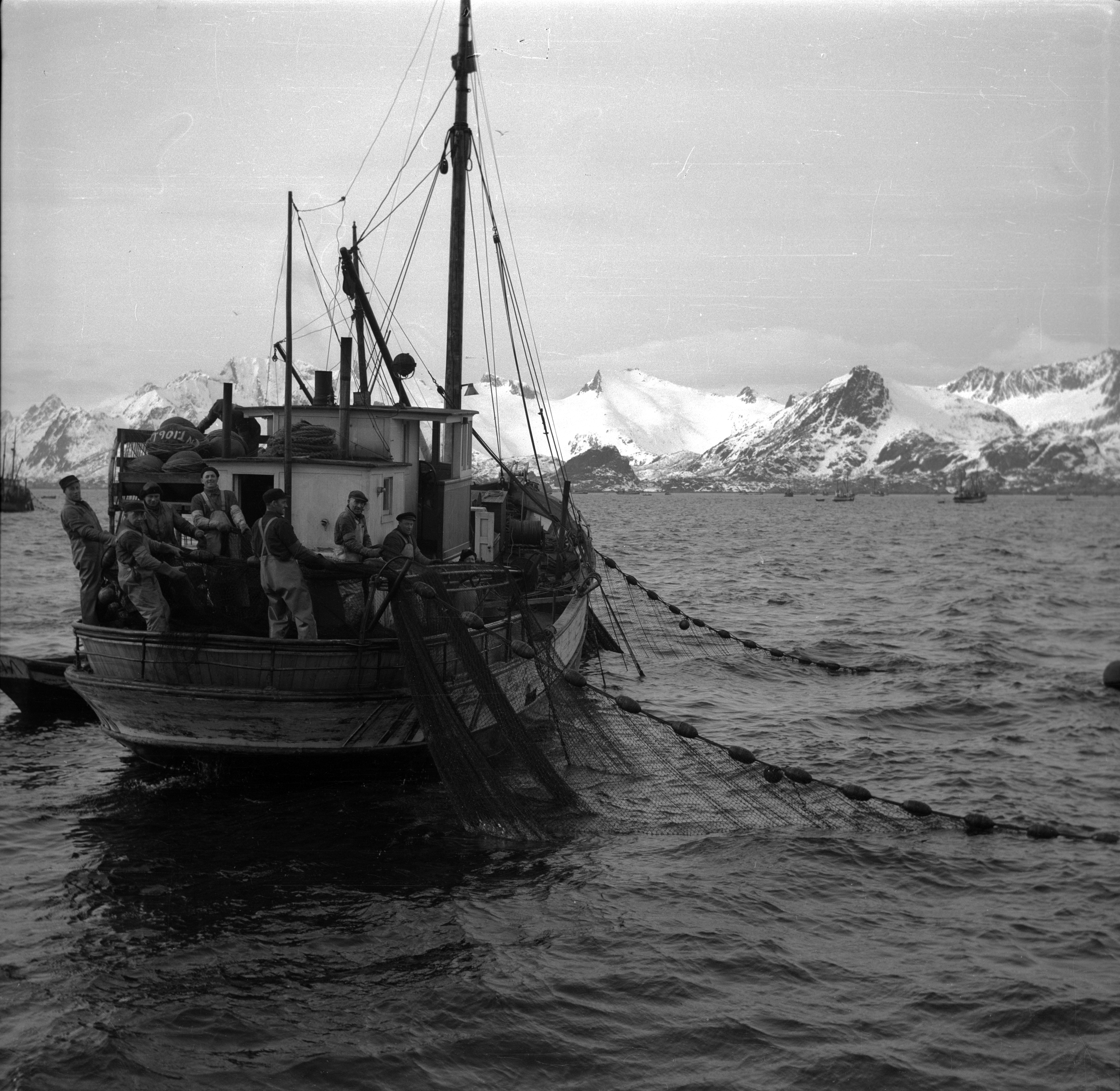 Bildet er hentet fra Nordlandsmuseet bildesamling etter Kanstad. Motivbeskrivelse: Fiske; båtlag Nøkkelord: Fiske Fangstanordninger og fiskeredskap Fiskebåter med tilbehør og utrusting Tilbehør og utrustning Organisasjon og fordeling av fiskefangst